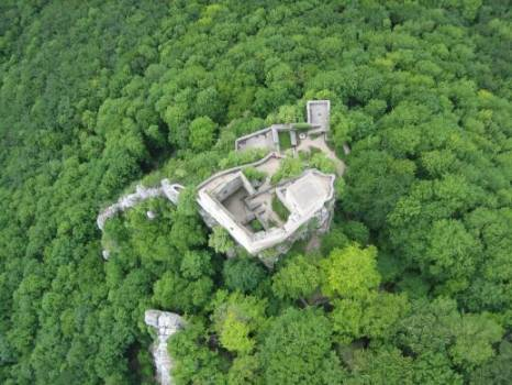 Reussenstein Luftaufnahme